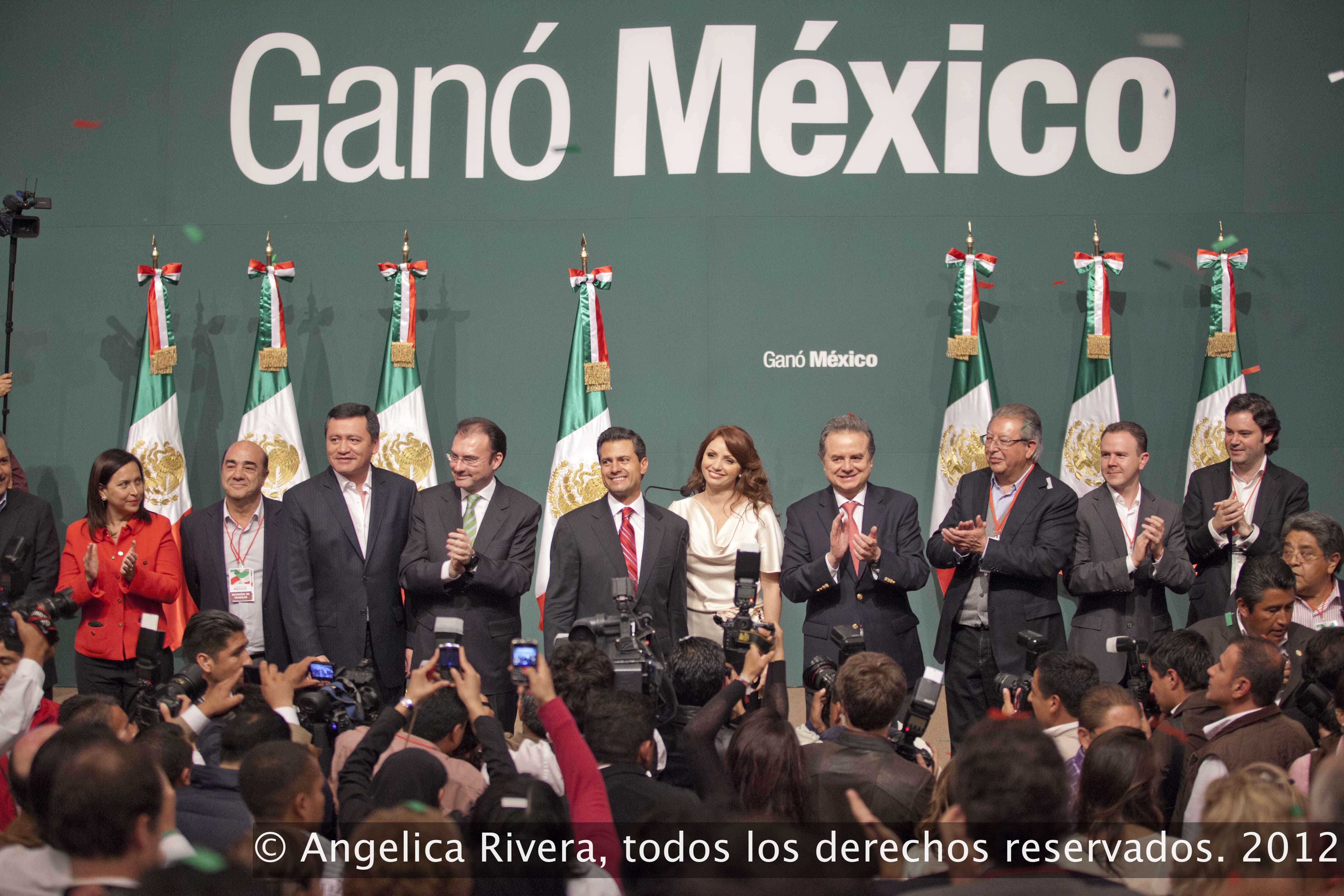 CEN del PRI, 1 julio 2012. Angelica Rivera en el Auditorio Plutarco Elías Calles en el CEN del PRI, Ciudad de México. Ciudad de México, México. 1 de Julio de 2012.